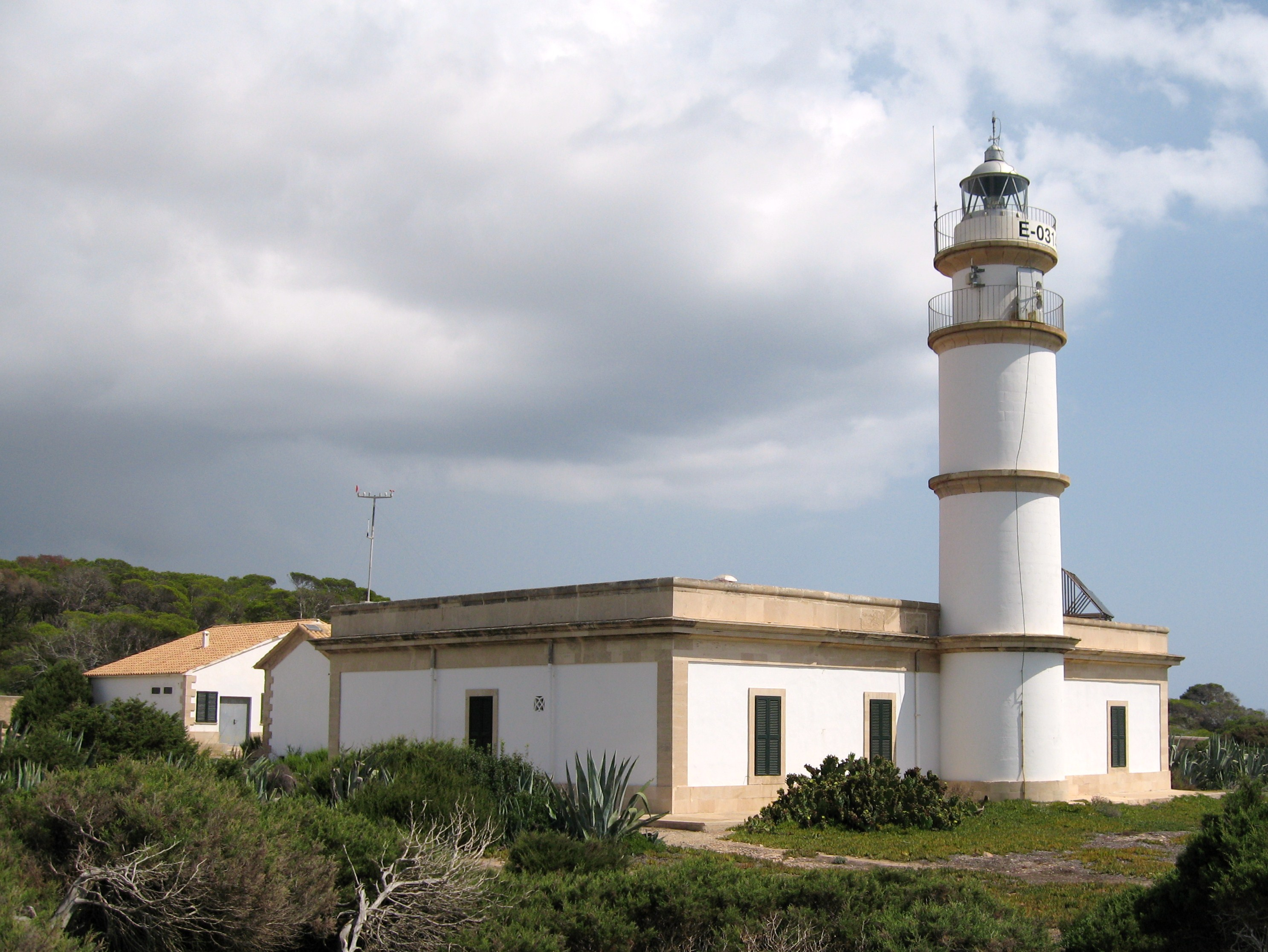 Leuchtturm am Cap de ses Salines, Gemeinde Santanyí, Mallorca, Spanien